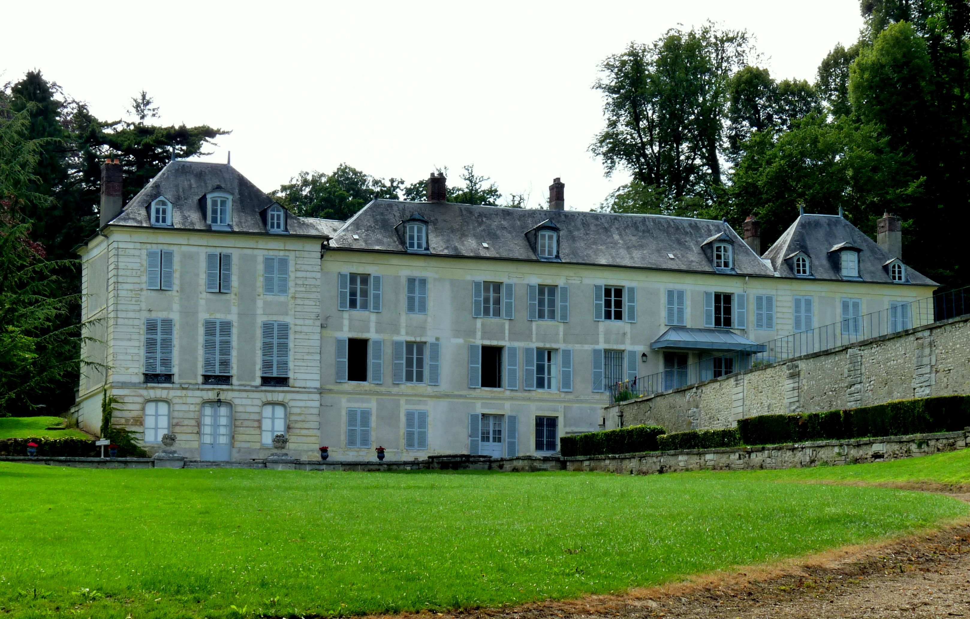 Château de Saint-Just